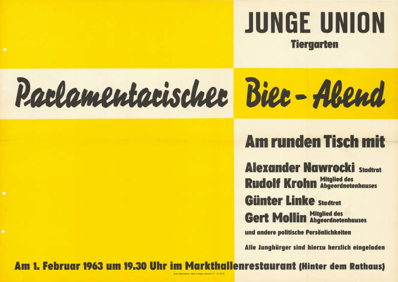 Junge Union Tiergarten Palamentarischer Bier-Abend Am runden Tisch mit Alexander Nawrocki Stadtrat Rudolf Krohn Mitglied des Abgeordnetenhauses Günter Linke Stadtrat Gert Mollin Mitglied des Abgeordnetenhauses ...Plakatart:AnkündigungsplakatAuftraggeber:JU Berlin-TiergartenDrucker_Druckart_Druckort:Albert Hentrich, Berlin-SteglitzObjekt-Signatur:10-028 : 320Bestand:Plakate von Jugendorganisationen der Parteien ( 10-028)GliederungBestand10-18:Plakate von Jugendorganisationen der Parteien (10-028) » CDU » Veranstaltungsplakate A - ZLizenz:KAS/ACDP 10-028 : 320 CC-BY-SA 3.0 DE